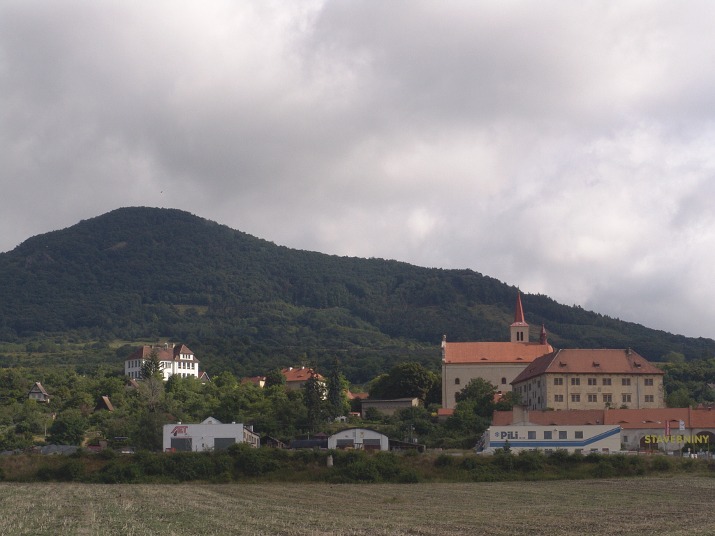 Žitenice od Litoměřic s pohledem na zámek a kostel, v pozadi Křížový vrch